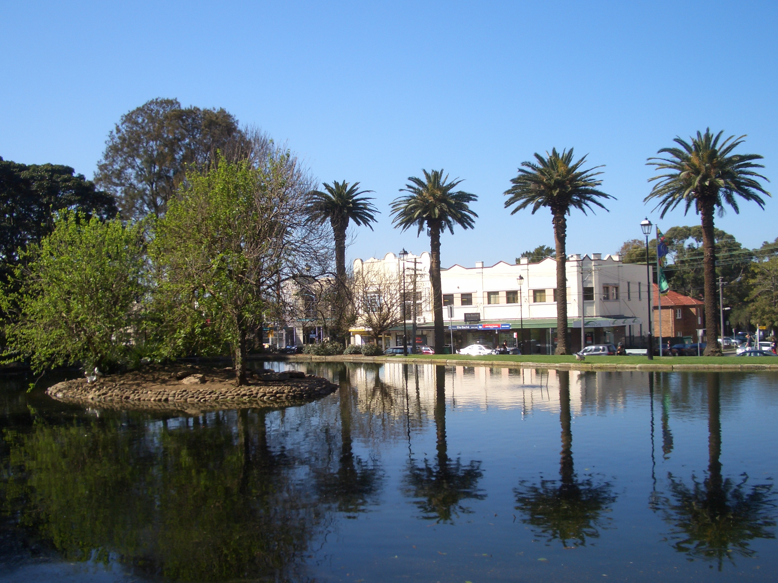 Burwood Park, Burwood Road